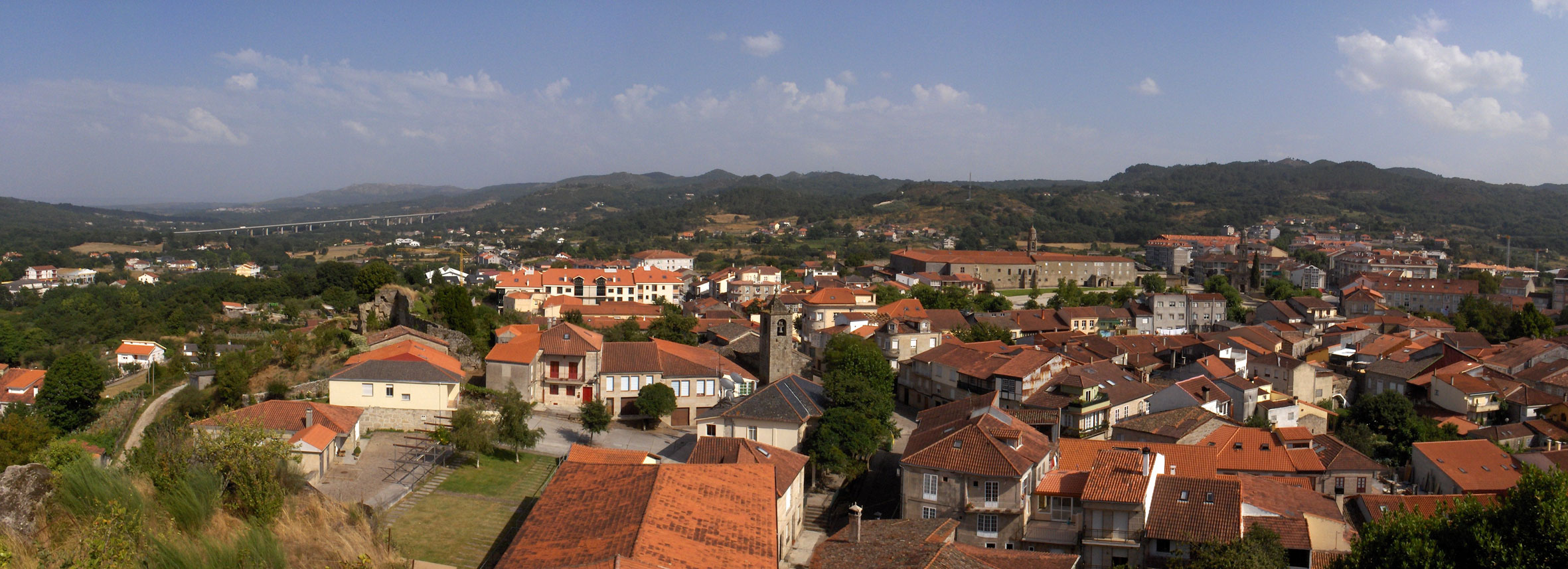 Tejados de Allariz vistos desde el camino al alto de "El Castillo"